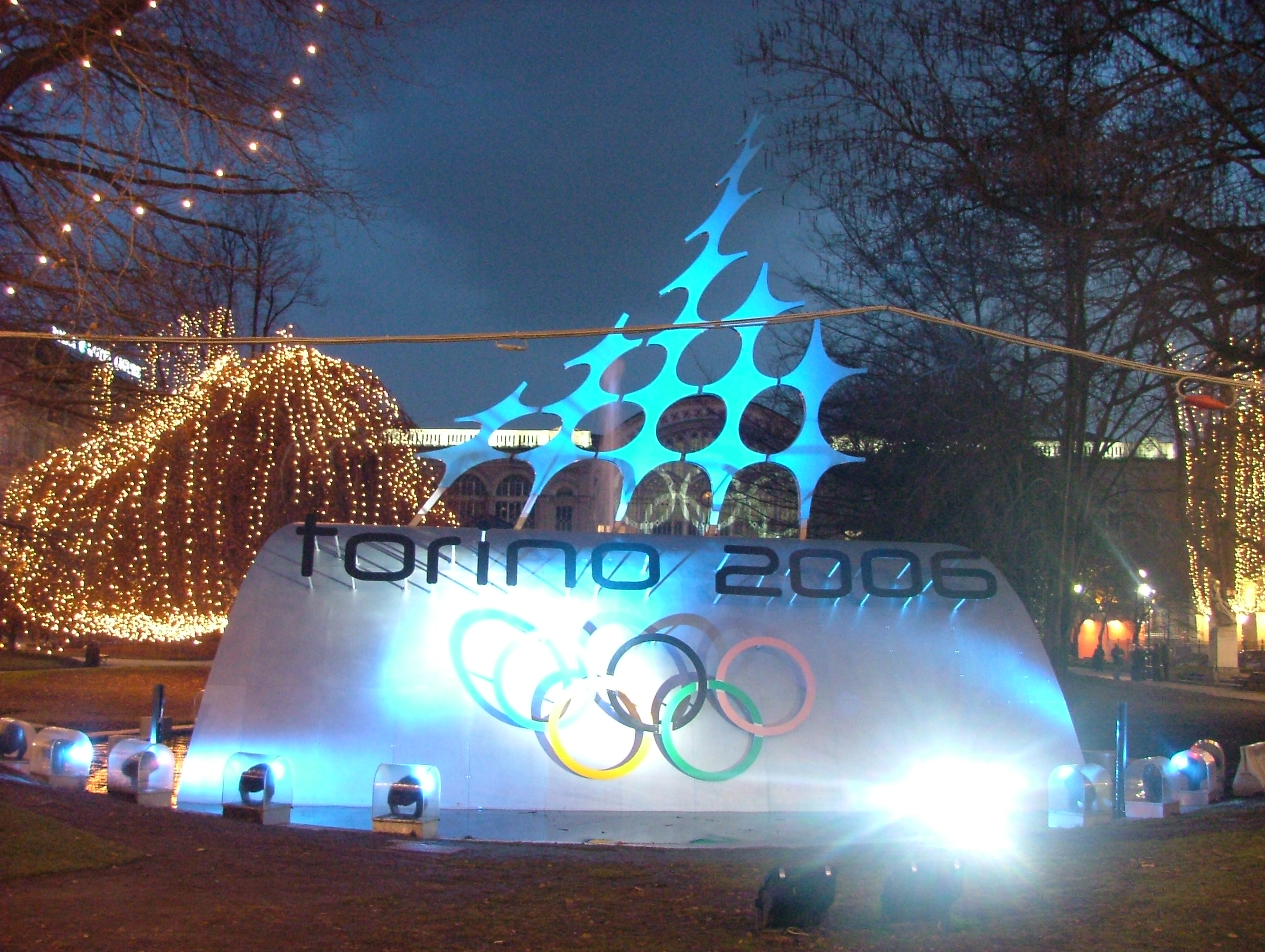 Torino olimpica: Piazza Carlo Felice